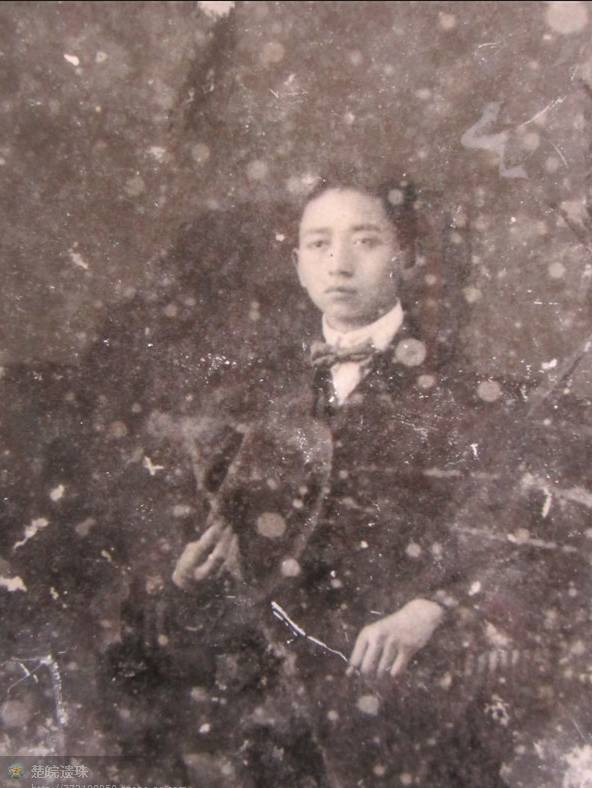 中国共产党安徽省临时委员会书记尹宽